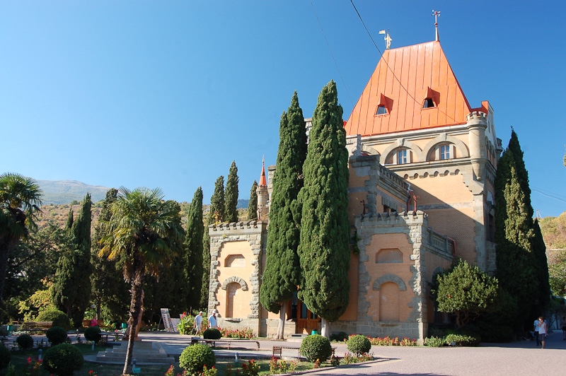 Колишній палац князів Гагаріних